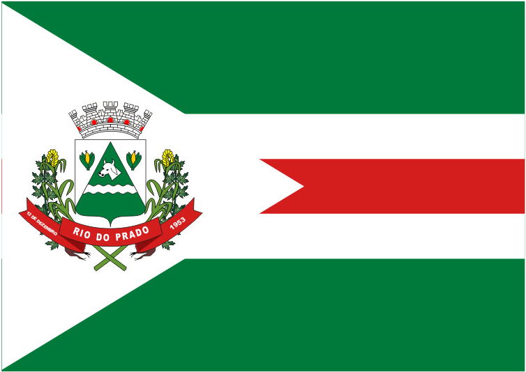 Bandeira da cidade de Rio do Prado do Estado de Minas Gerais, Brasil